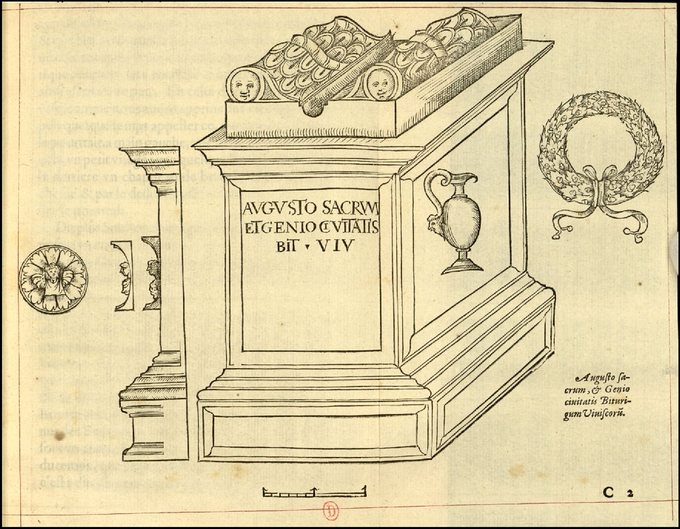 Vinet Antiqvité de Bordeavs Tombeau romain (1574)